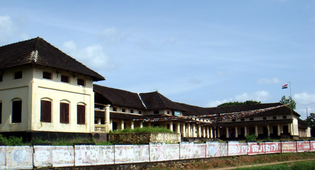 അങ്കമാലിയിലെ പഴക്കം ചെന്ന വിദ്യാലയം